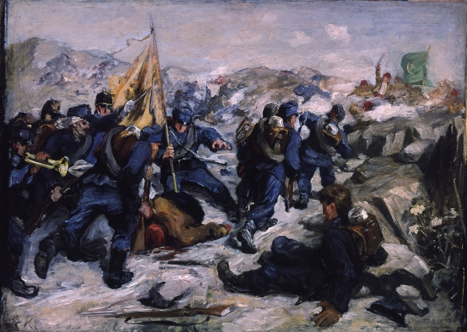 Österreichischer Infanterieangriff im Bosnienfeldzug 1878, Ölgemälde im Heeresgeschichtlichen Museum in Wien.